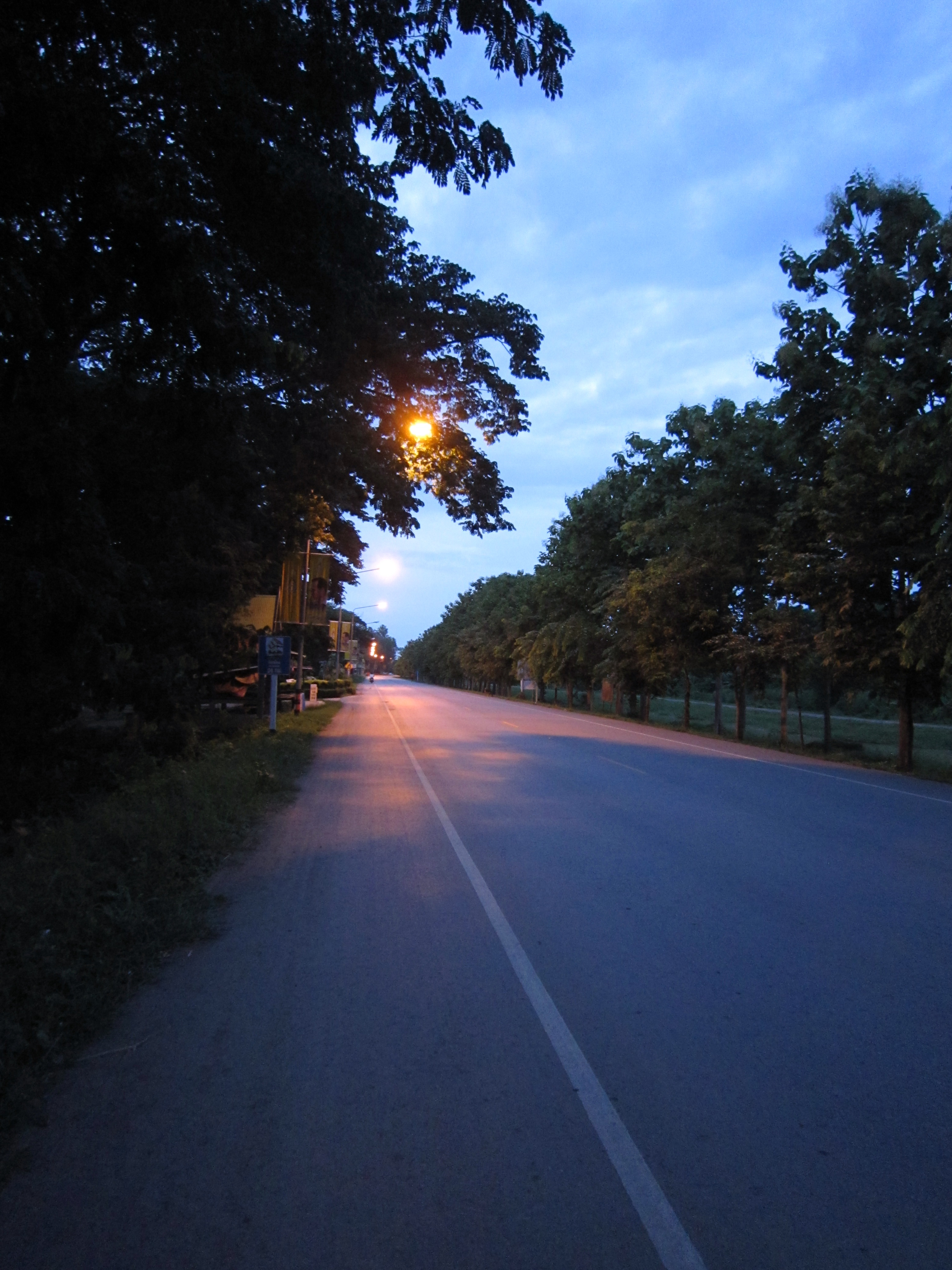 Morning@Supphaya